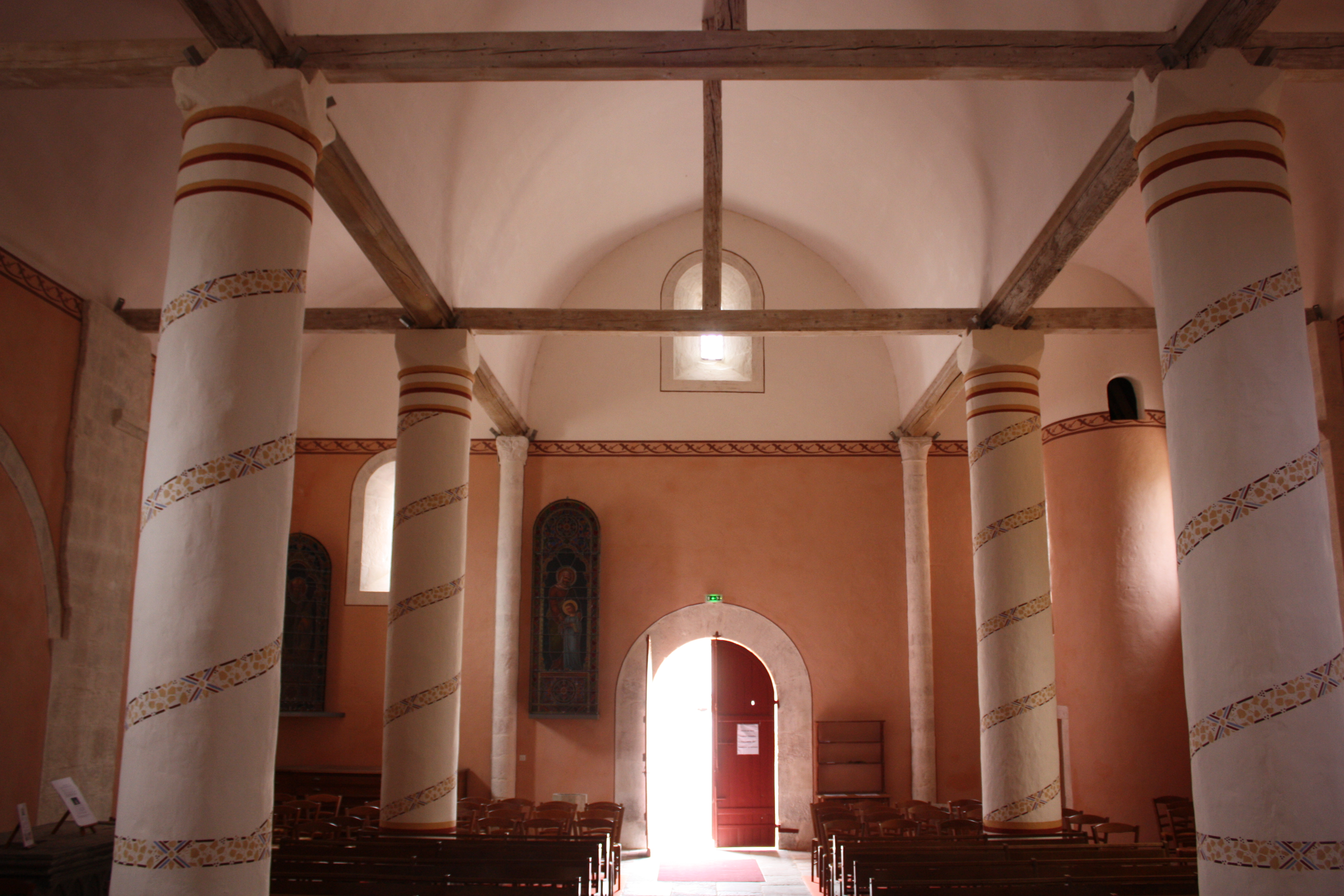 Le Breuil (Allier) - Église romane Sainte-Anne, photographie attribuée par erreur à l'ancienne église Saint-Blaise, aujourd'hui détruite.